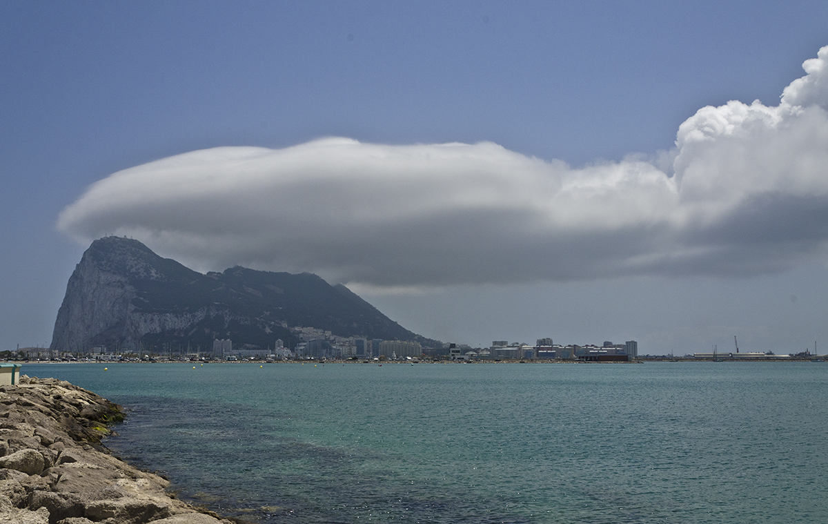 El Peñón de Gibraltar desde la Linea de la Concepción ( CADIZ )